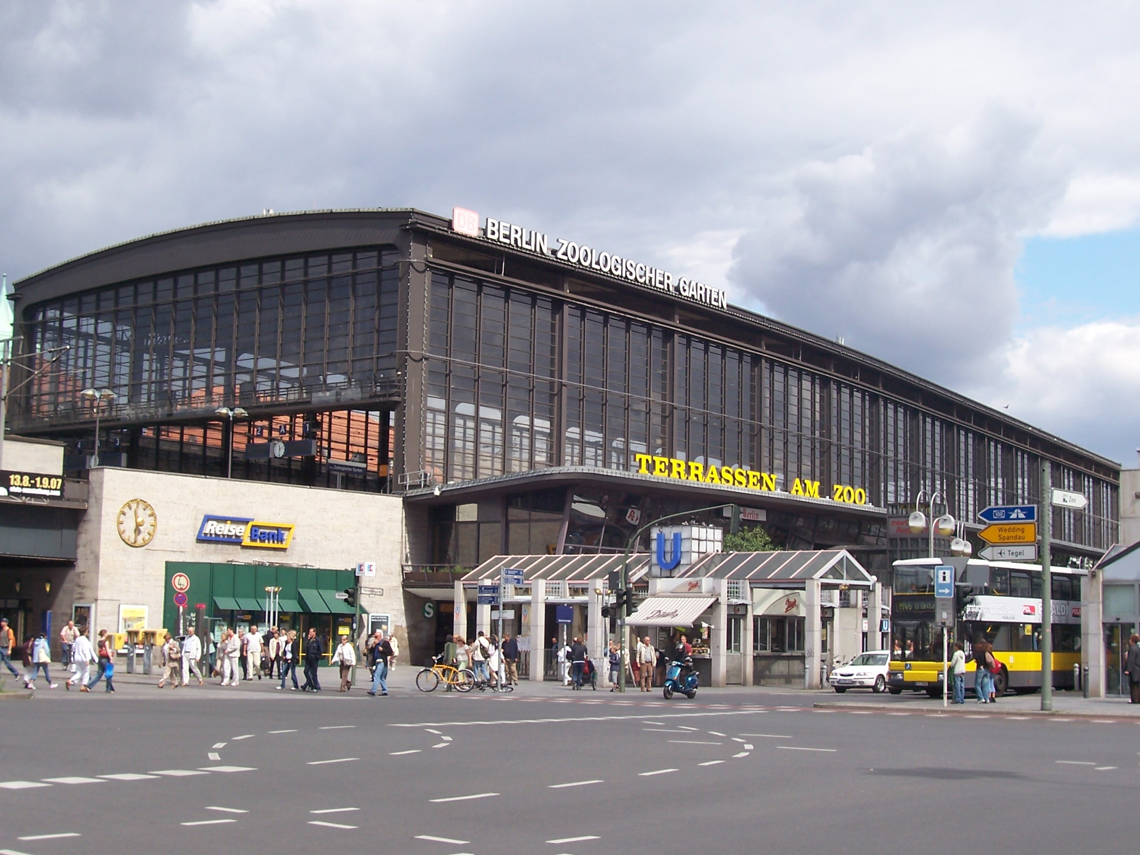 Bahnhof Berlin Zoologischer Garten